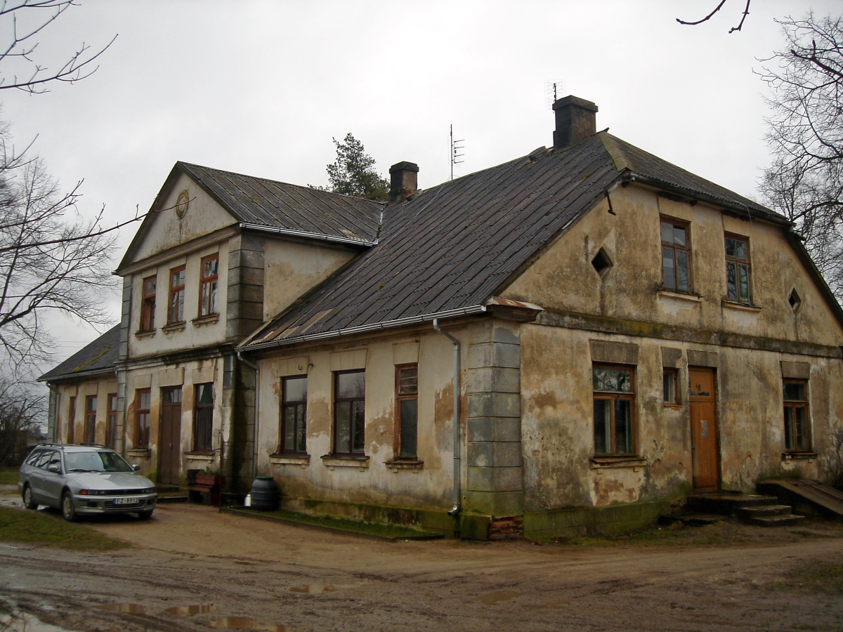 Mazvirbi manor